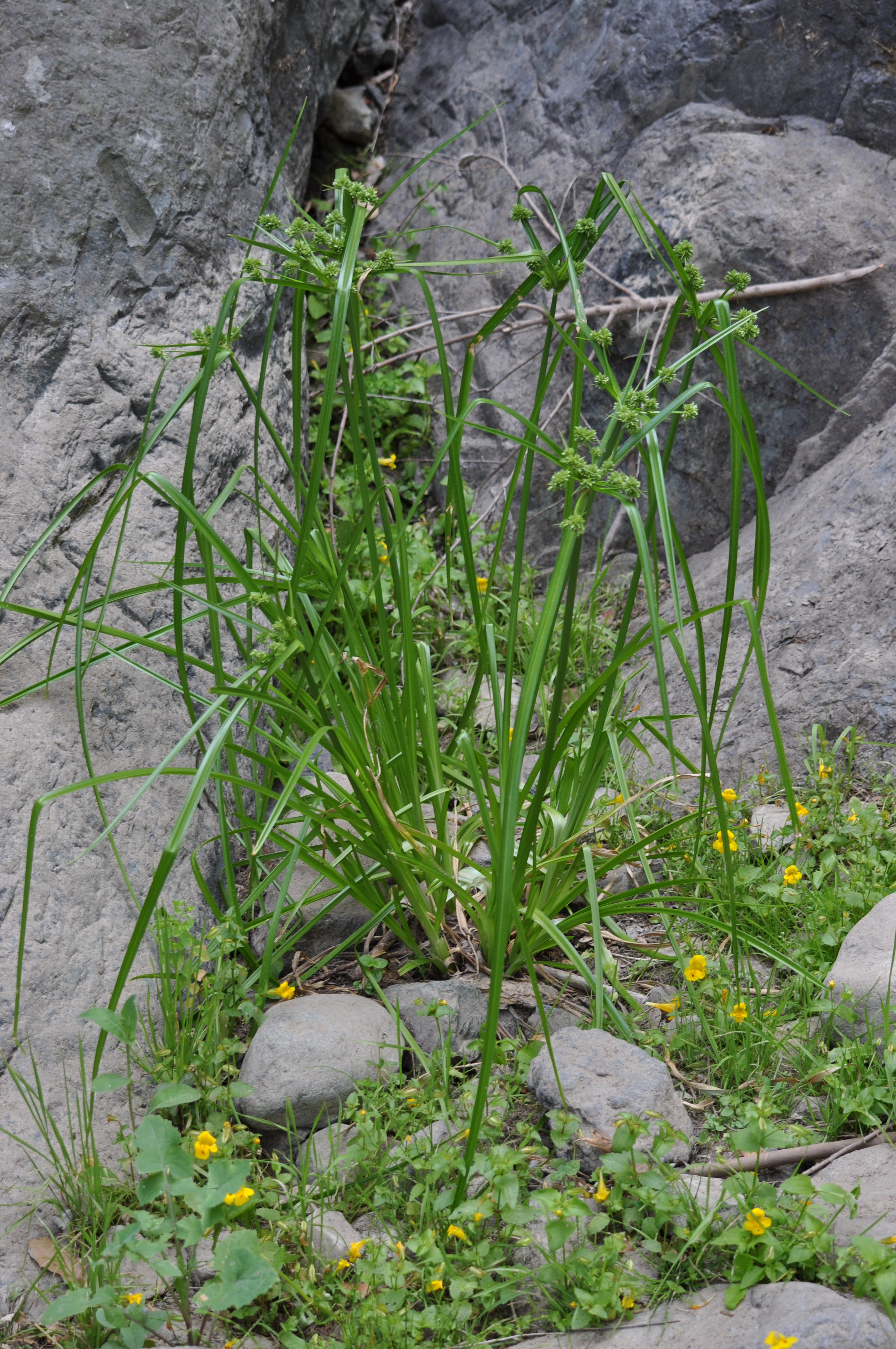 Cyperus eragrostis en el parque nacional La Campana, Región de Valparaíso, Chile. Sector de la "Primera Aguada". La especie crece en las zonas más húmedas del parque. Esta foto, sin embargo, ha sido tomada en un año de sequía.